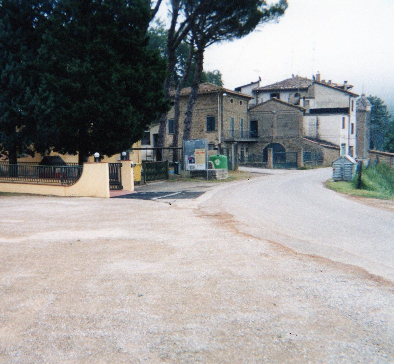 Veduta del borgo di Petrella (PG)